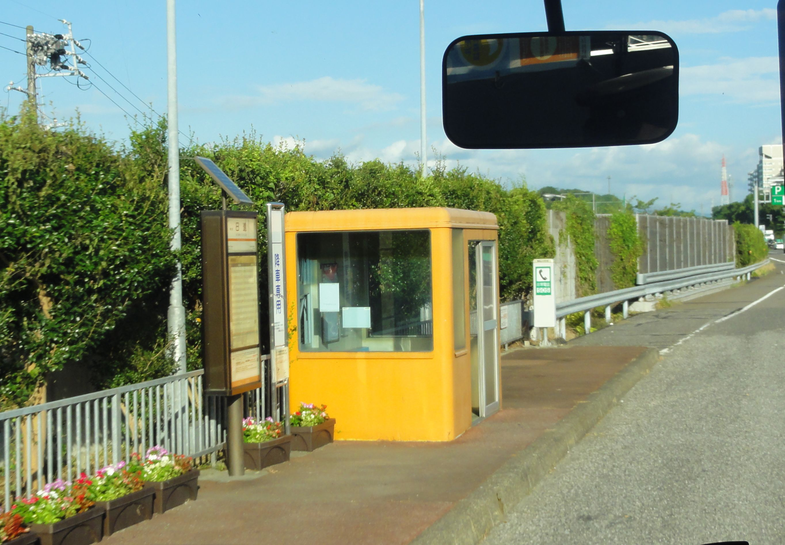 東名日進バスストップ上り線施設